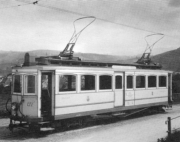 Triebwagen CFZe 4/4 der Trogenerbahn